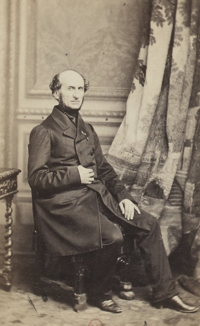 Album des députés au Corps législatif entre 1852-1857.